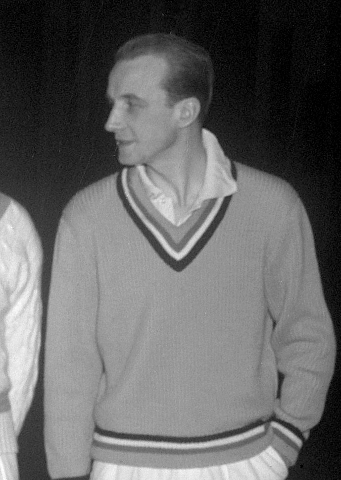 Bernard Destremau op Marlot tennis